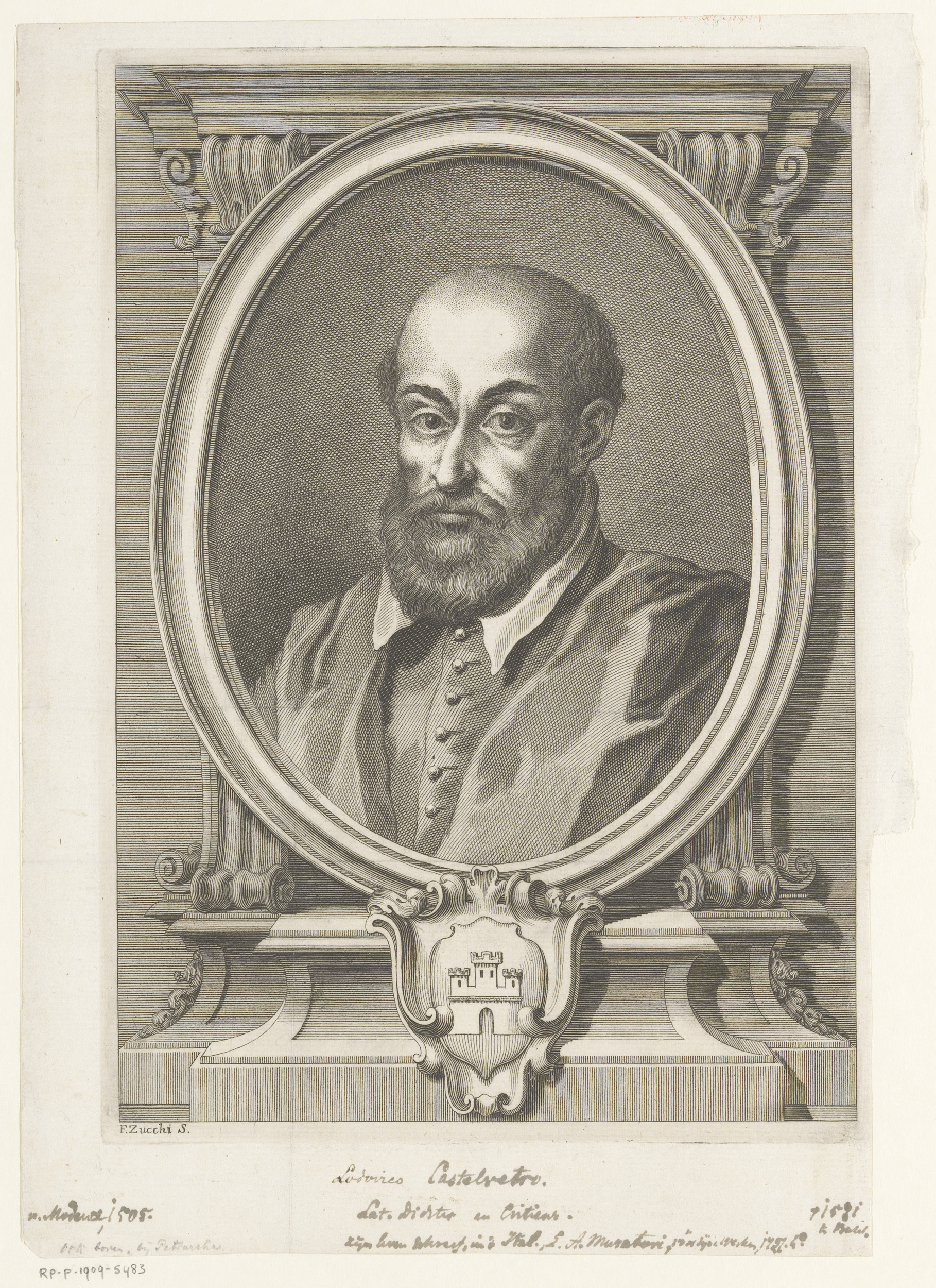 IdentificatieTitel(s): Portret van filoloog Ludovico CastelvetroObjecttype: prent Objectnummer: RP-P-1909-5483Opschriften / Merken: verzamelaarsmerk, verso, gestempeld: Lugt 2228opschrift, recto onder, handgeschreven in bruine inkt: ‘N. Modena 1505 Lodovico Castelvetro Lat. [...] zijn leven [...] 1581 te [...]’VervaardigingVervaardiger: prentmaker: Francesco Zucchi (vermeld op object)Plaats vervaardiging: ItaliëDatering: 1702 - 1764Fysieke kenmerken: ets en gravureMateriaal: papier Techniek: graveren (drukprocedé) / etsenAfmetingen: plaatrand: h 255 mm × b 180 mmOnderwerpWat: historical personsWie: Ludovico CastelvetroVerwerving en rechtenVerwerving: aankoop 1905Copyright: Publiek domein